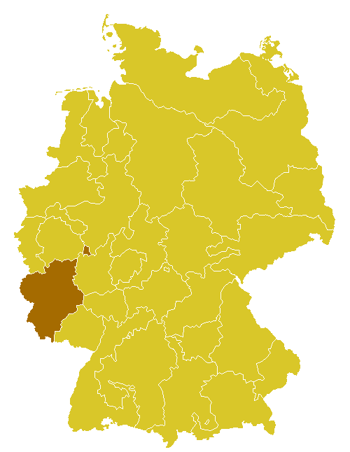 Beschreibung: Katholische Diözese/Bistum in Deutschland